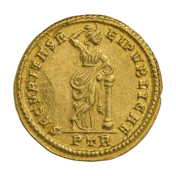 Солид. Константин I Великий. Ок. 319—320 гг. (реверс). Под обрезом PTR. Секурита (персонификация безопасности) стоит прямо; голова повернута вправо; опирается на колонну, с поднятой правой рукой.